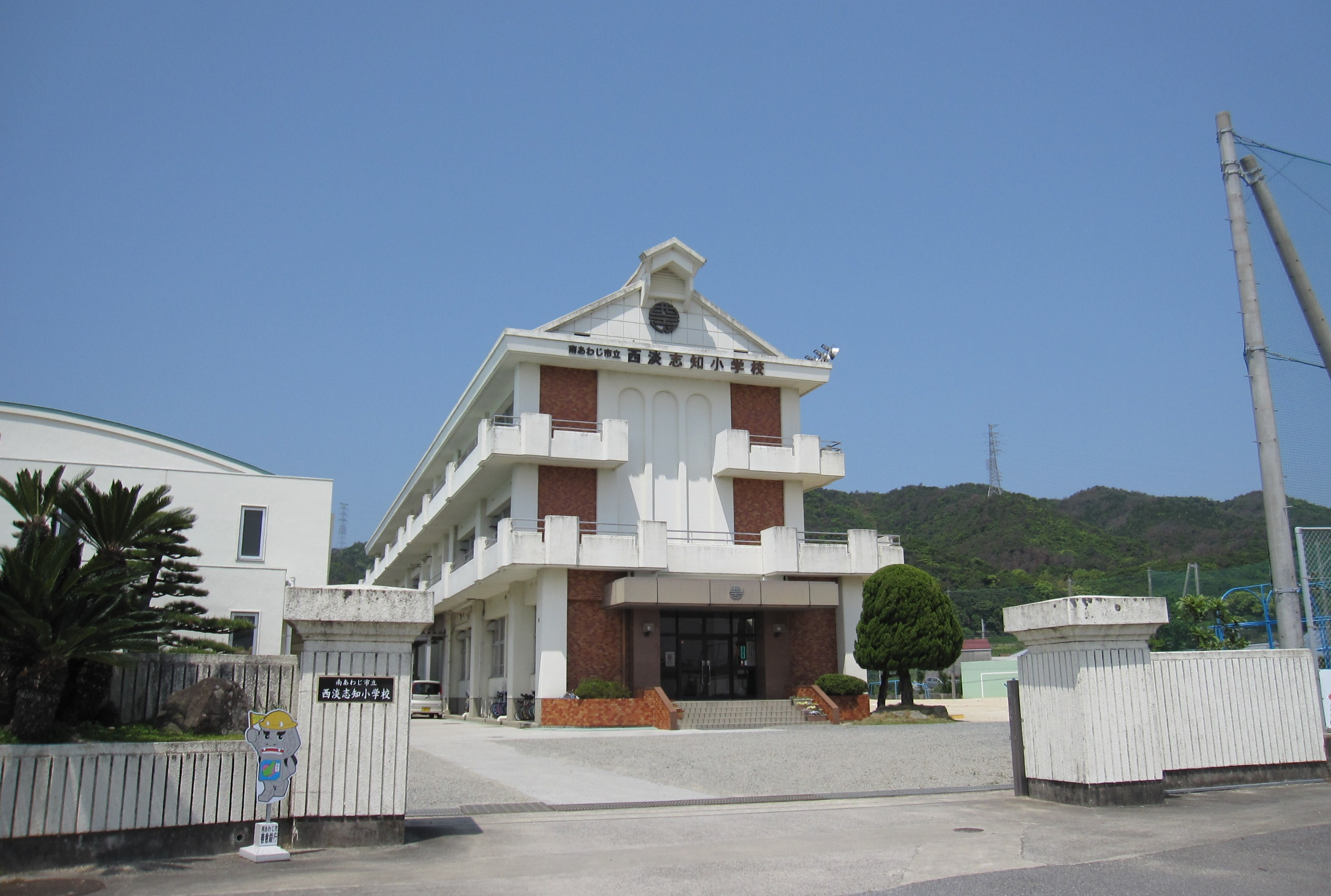 南あわじ市立西淡志知小学校